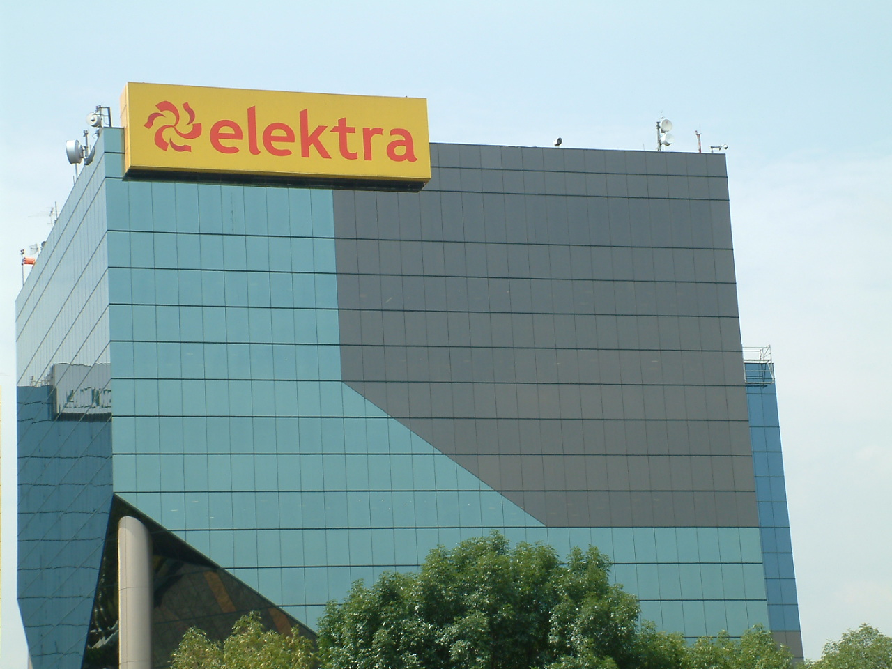 Fotografía del eificio corporativo de Grupo Elektra.